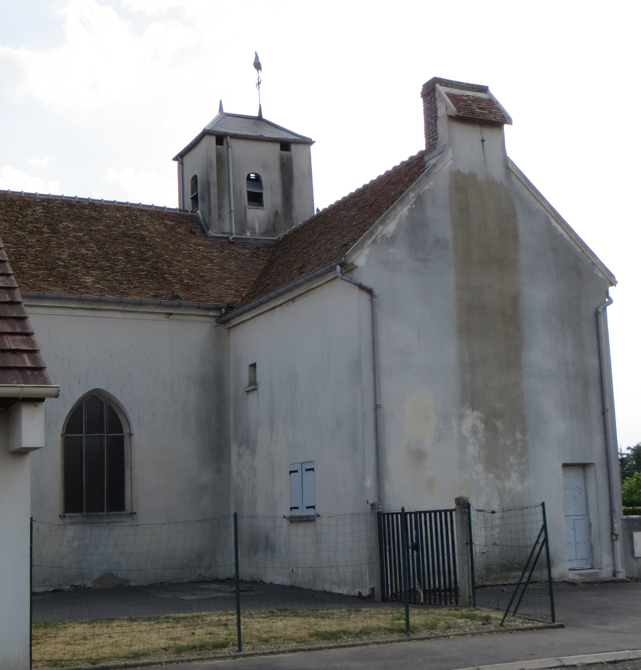 Vue de l'église